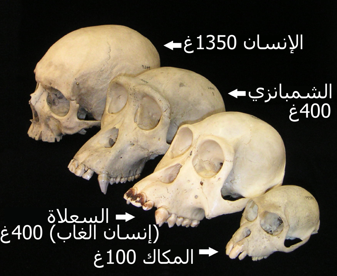 جماجم رئيسيَّات من متحف علم الحيوان المقارن، في جامعة هارفرد.